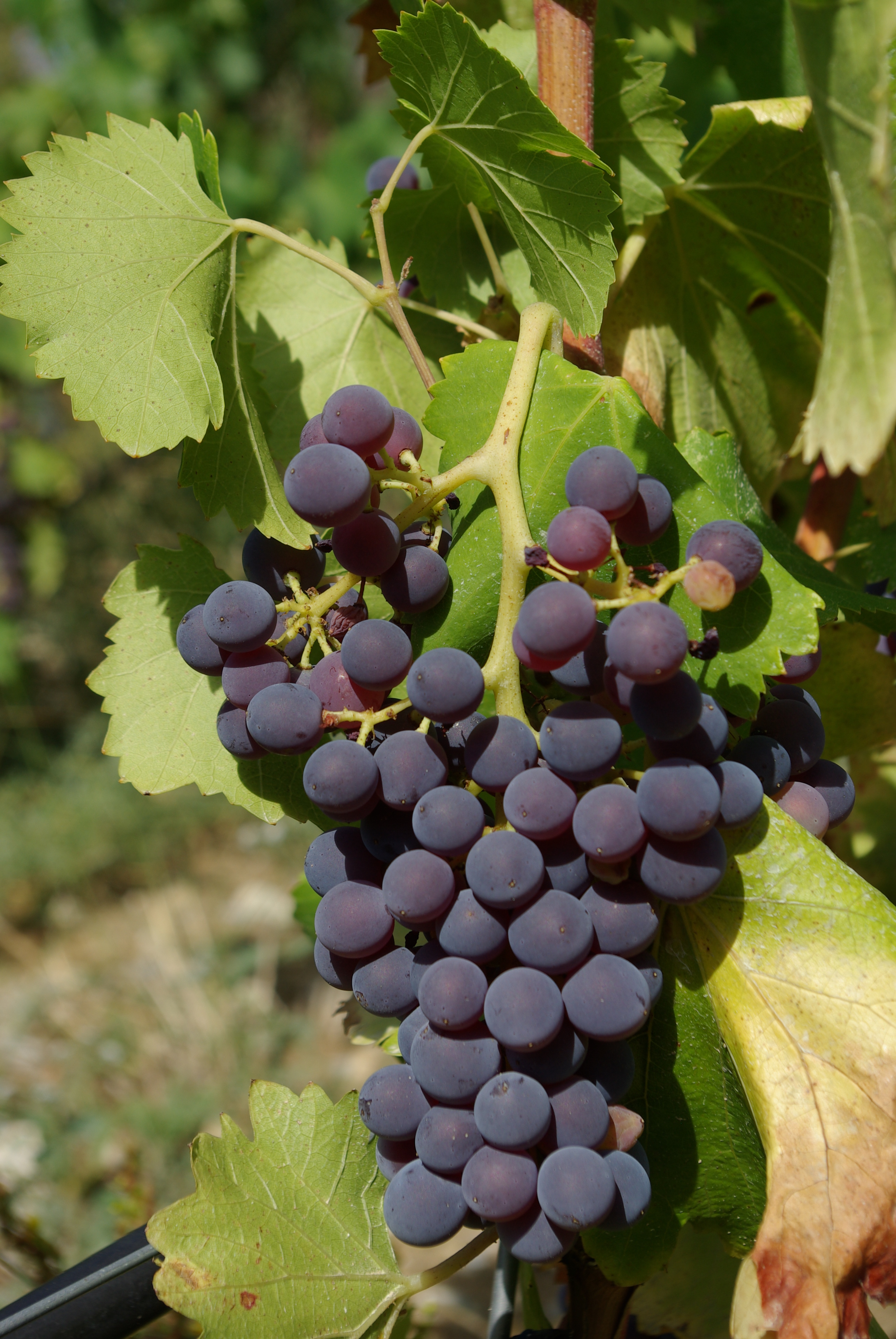 Grenache, grape variety